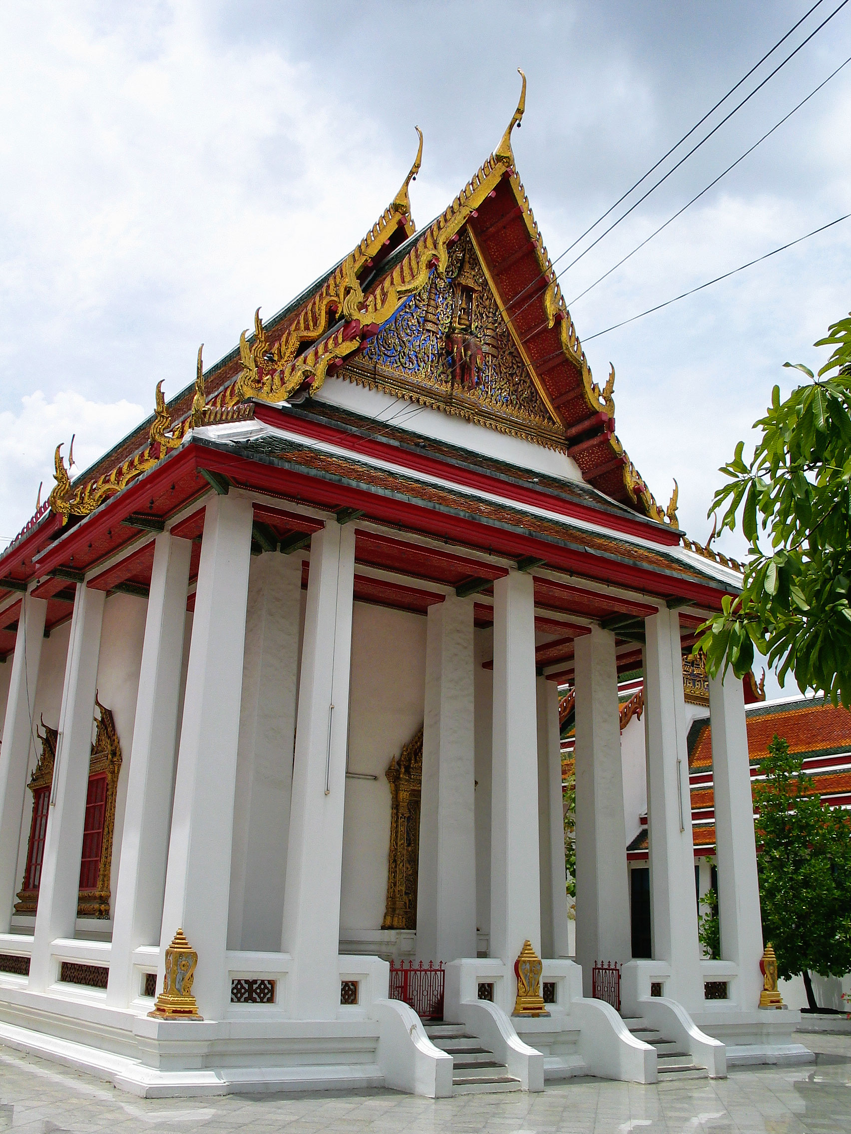 Ubosot of Wat Maha Phruettharam, Bangrak district, Bangkok, Thailand